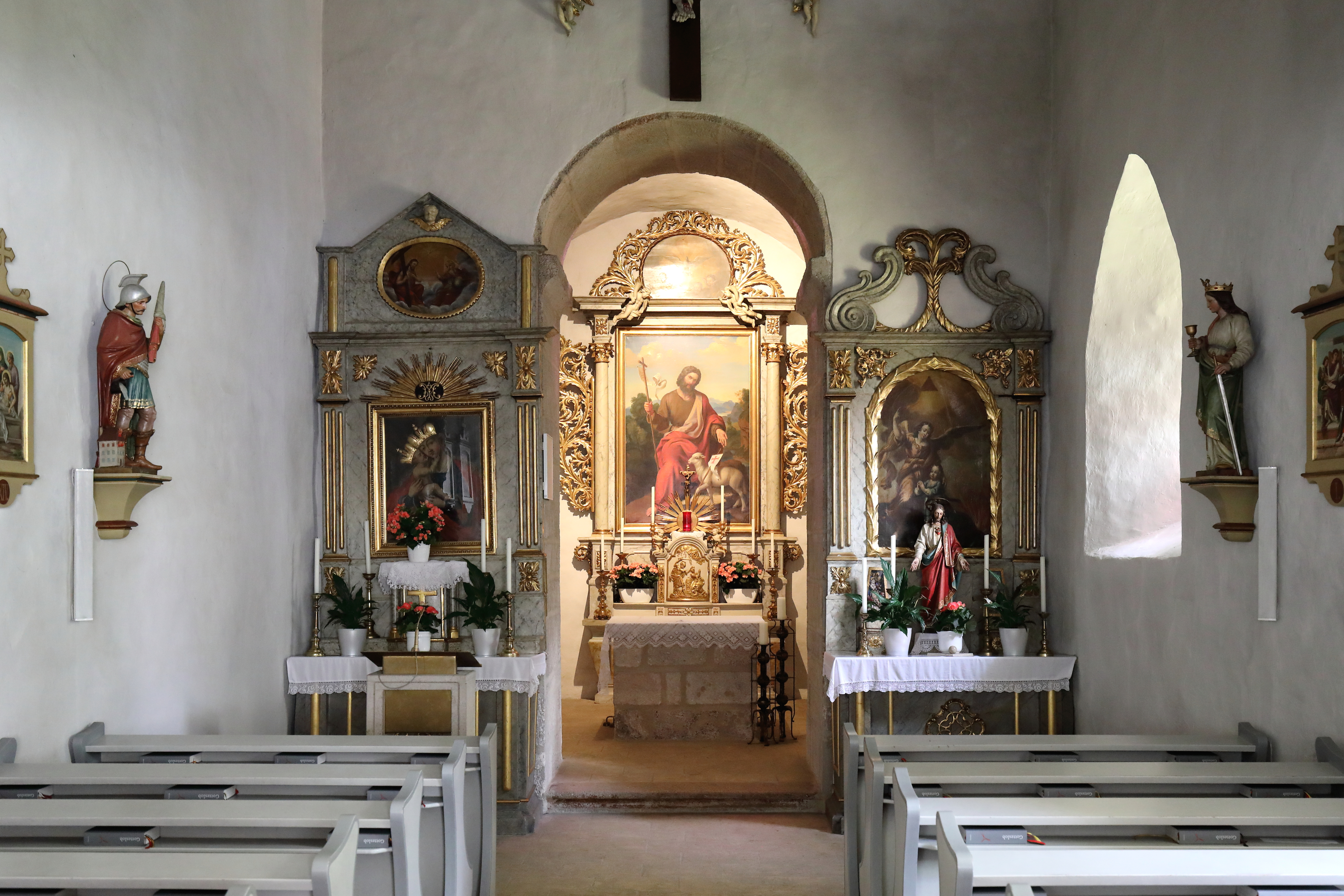 Innenansicht der röm.-kath. Pfarrkirche hl. Johannes der Täufer in Maiersdorf, ein Dorf in der niederösterreichischen Gemeinde Hohe Wand, in Richtung Hochaltar. Das Hochaltarbild Johannes der Täufer aus dem Jahr 1848 malte Franz Dobiaschofsky.